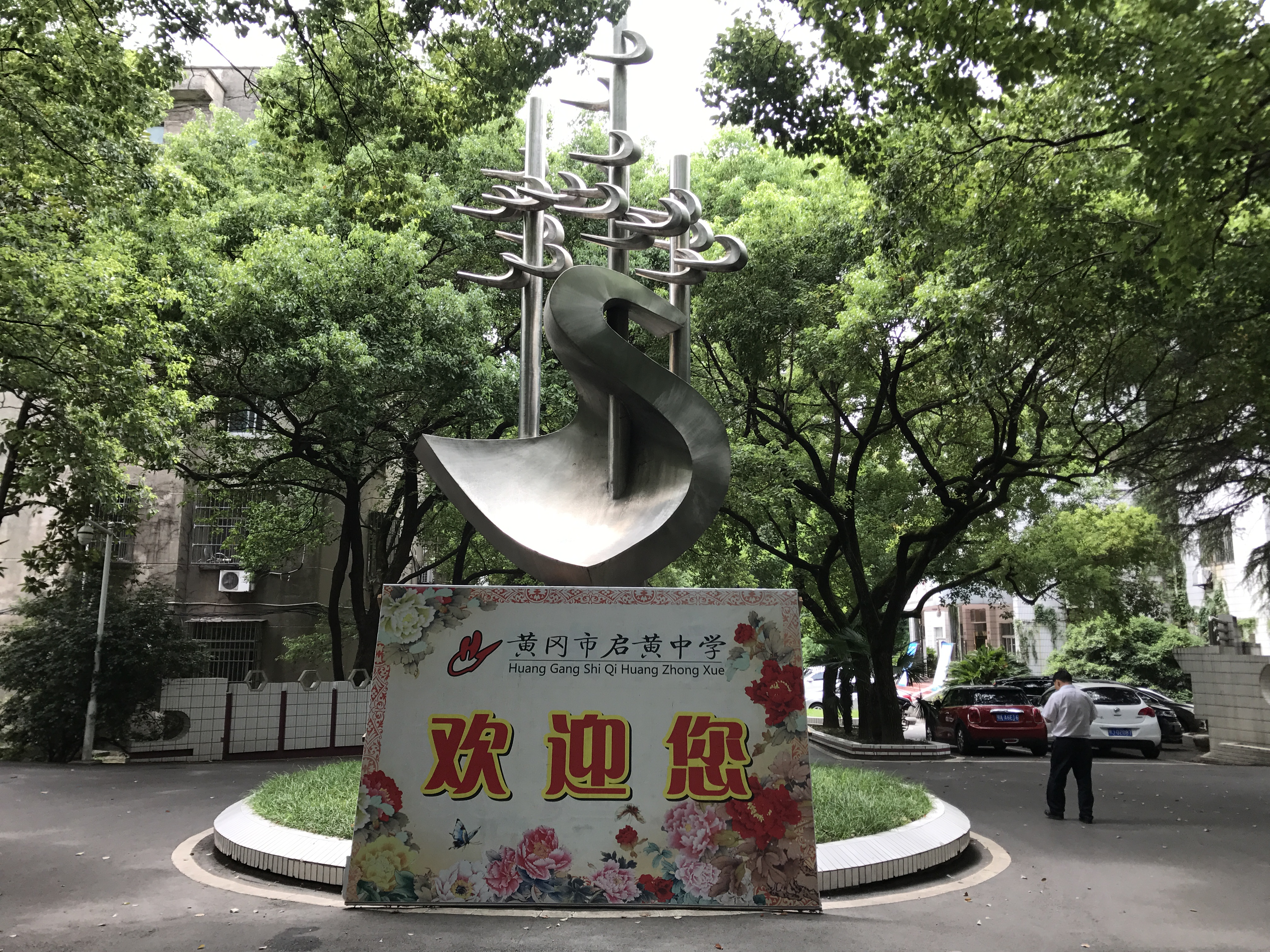 湖北省黄岡市黄州区・黄岡市啓黄中学(黄岡中学旧キャンパス)